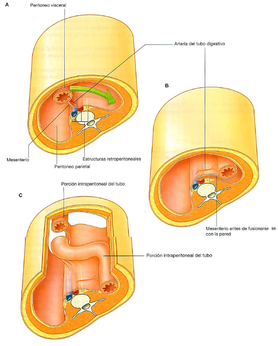 Esquema que explica la clasificación de los organos intra y retroperitoneales